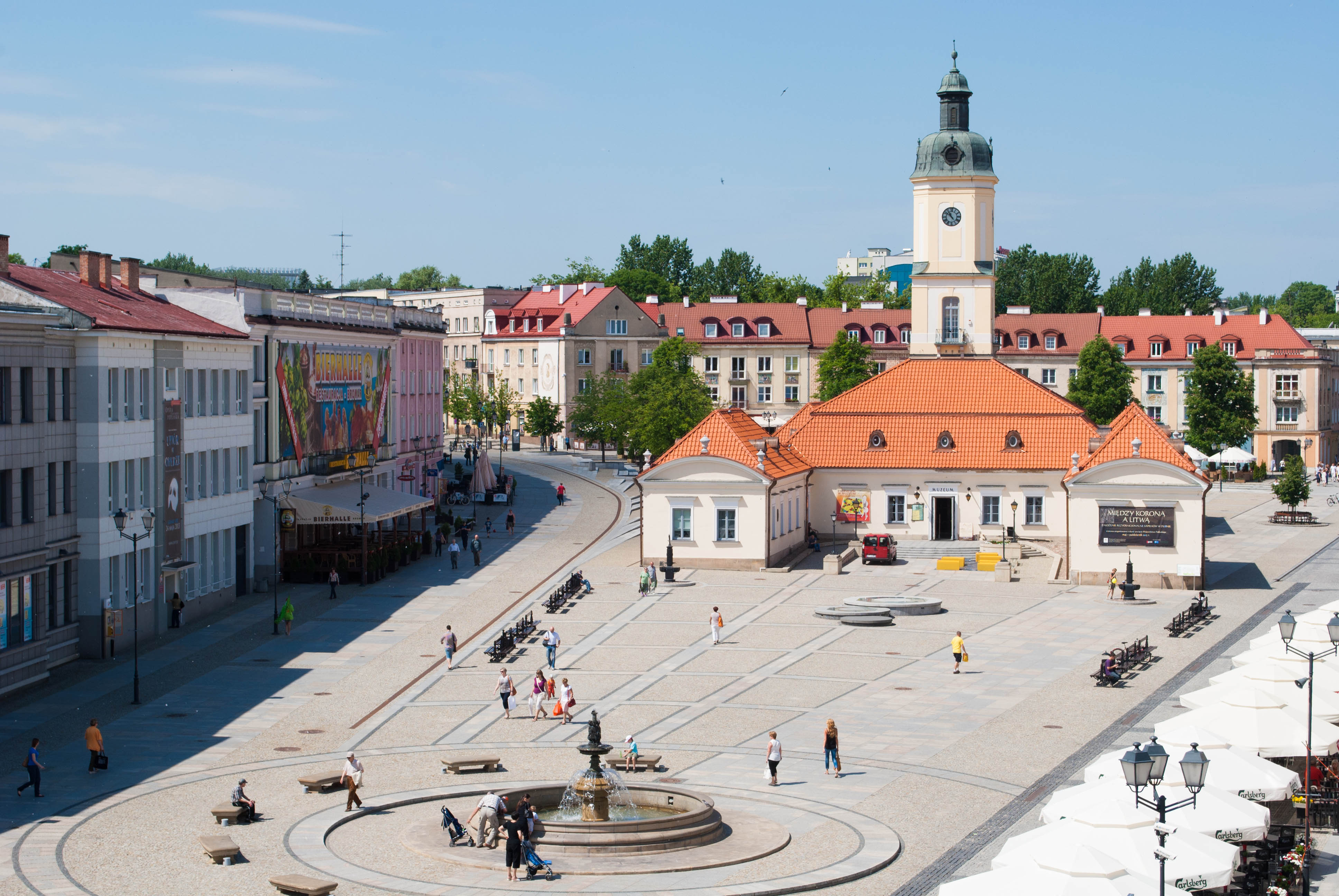 Białystok, ratusz, ob. muzeum, 1745-1761